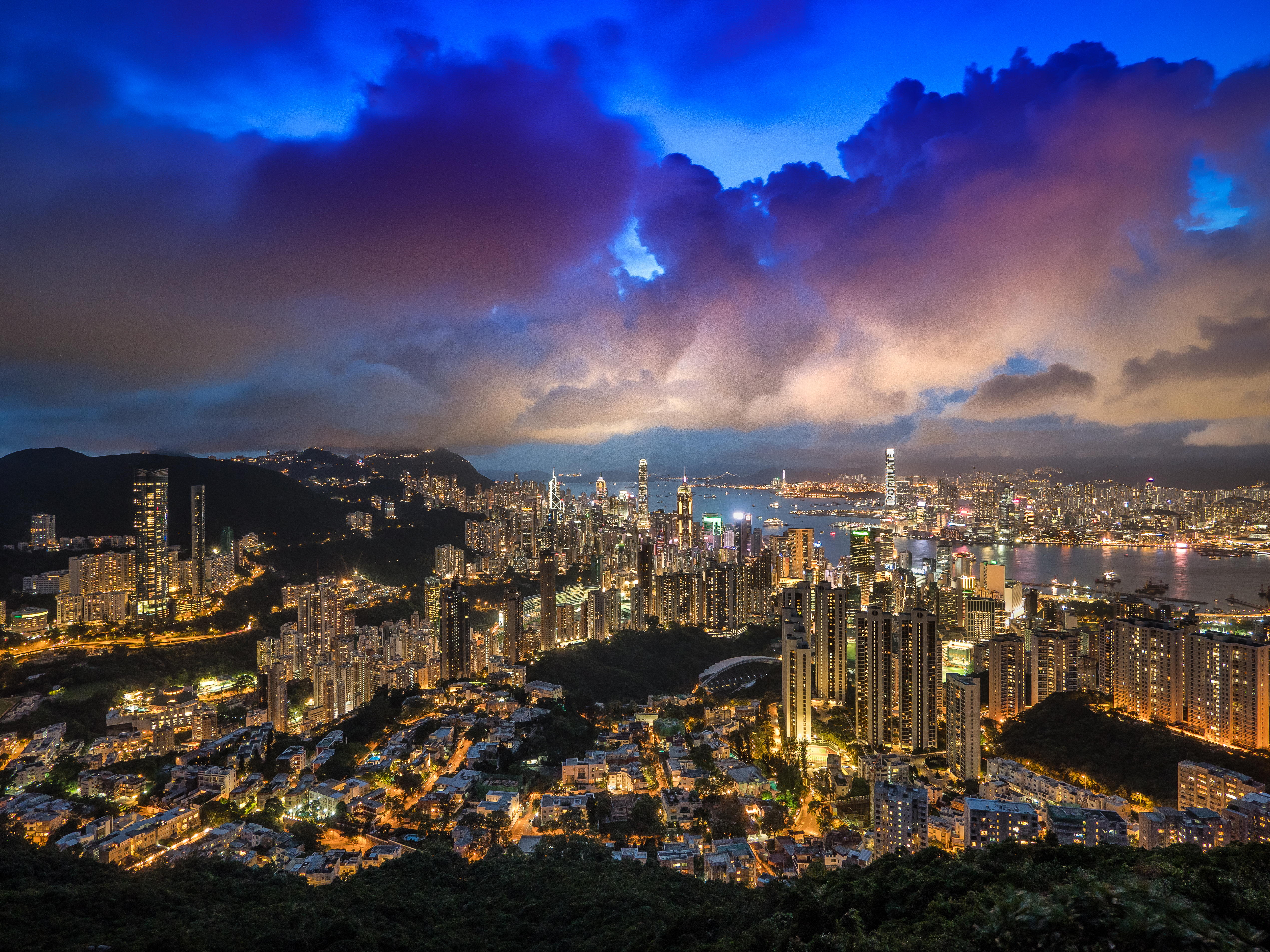 Happy Valley Dusk View